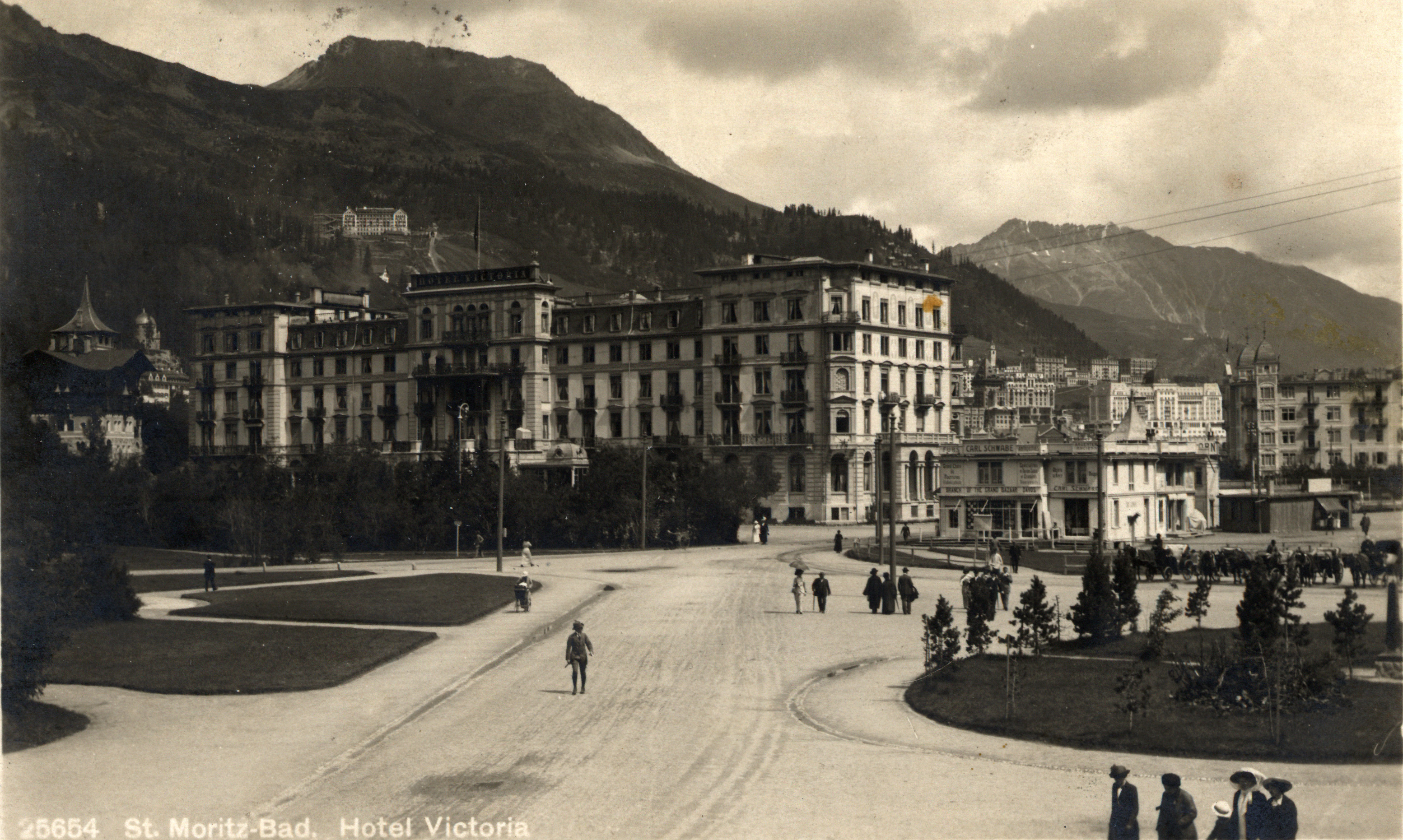 Template:Ansichtskarte Hotel Victoria in St. Moritz Bad, um 1910